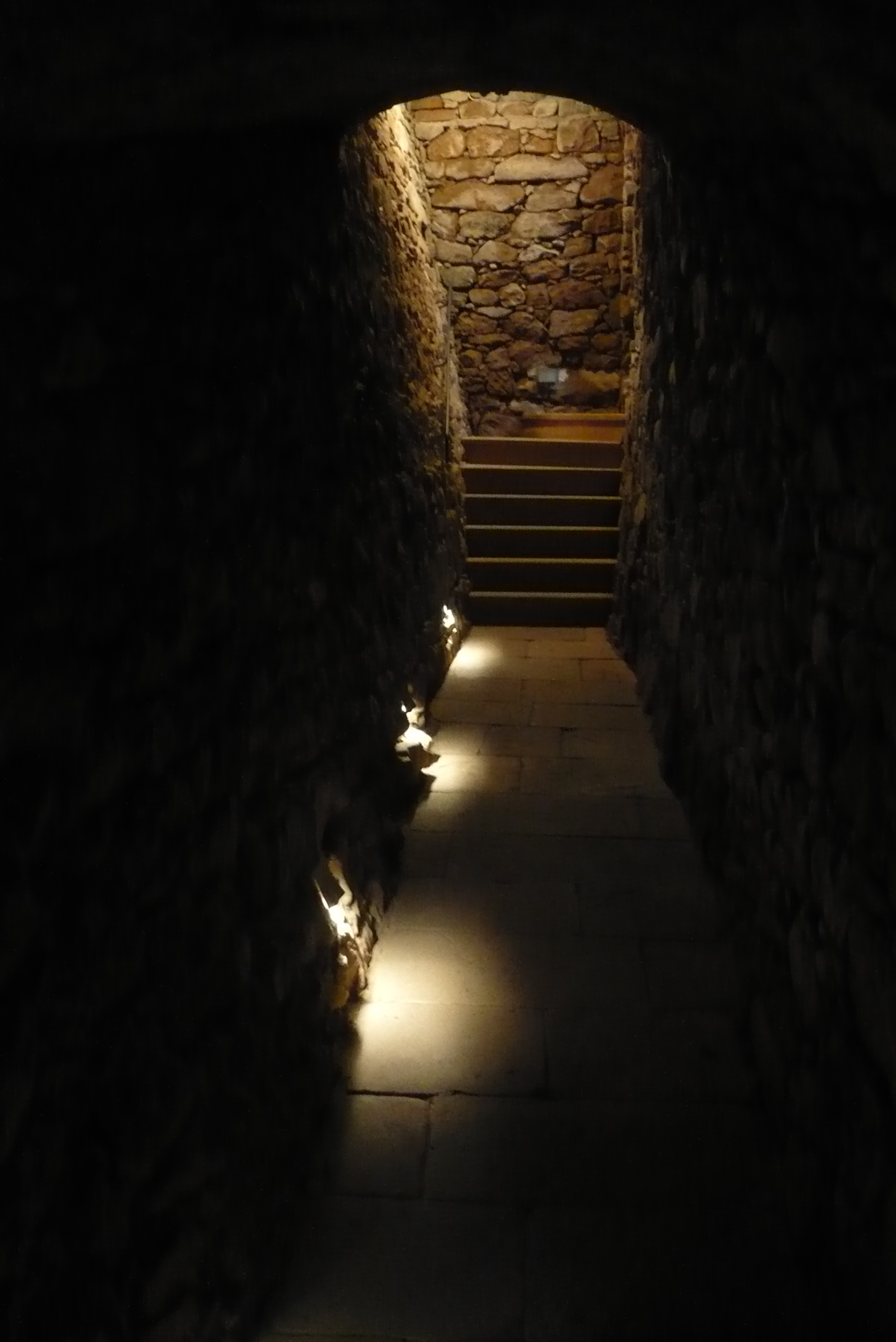 Podziemia budynku bramnego w zamku Sarny